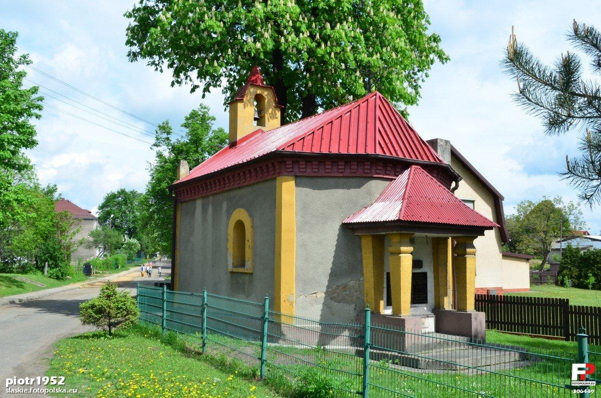 Kapliczka przy ul. Witosa - ul. Szkolna